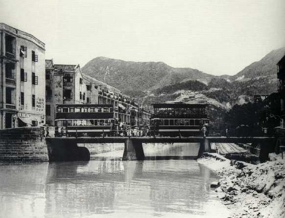 1920年代的銅鑼灣鵝頸橋，圖片來自香港歷史博物館。